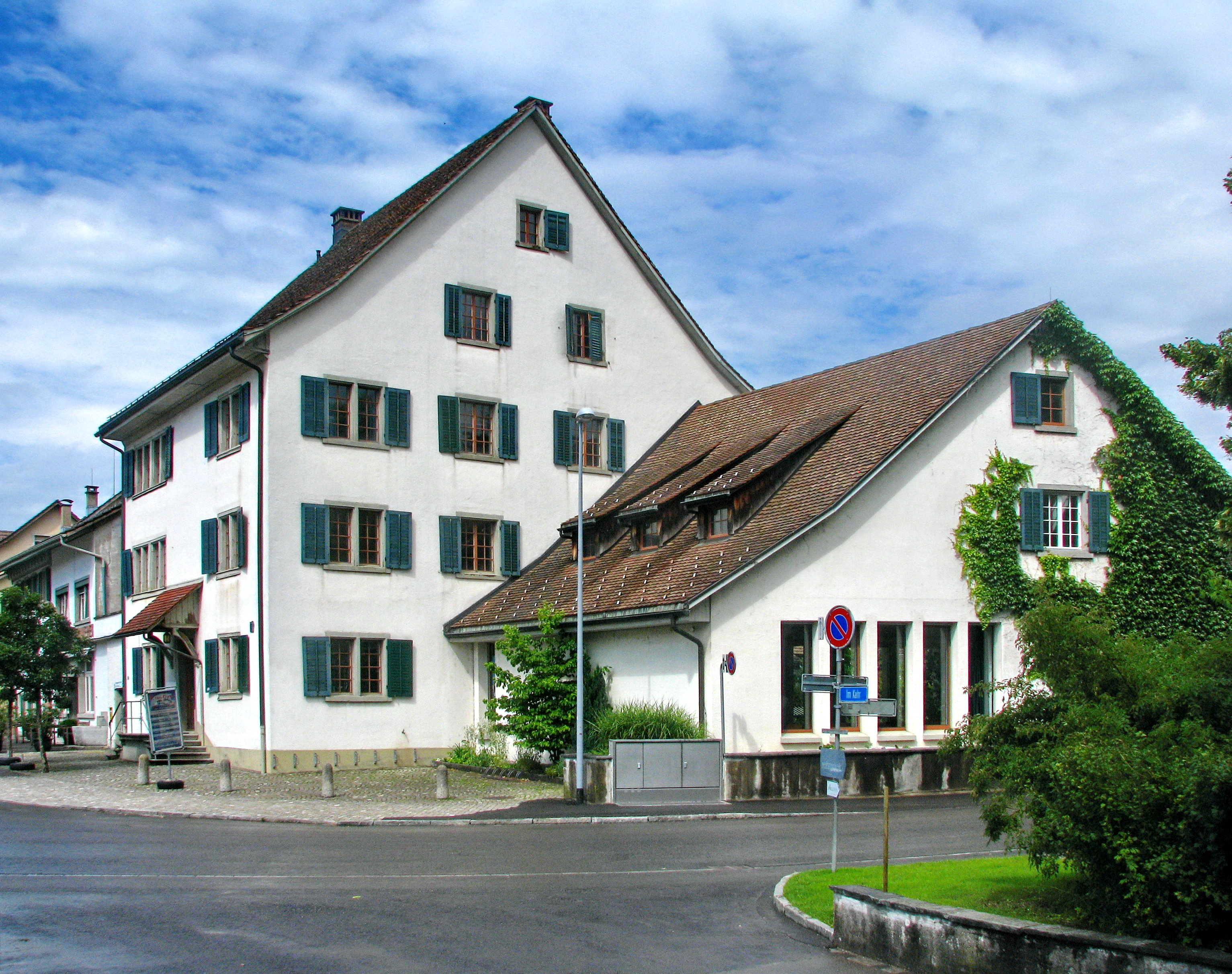 Pfäffikon (ZH) : Pfarrhaus, einstiger Amtssitz von Pfarrer Bernhard Hirzel, Oberländer Wortführer im Züriputsch 5./6. September 1839. Umgebaut, restauriert 1976/77 und unter Bundesschutz gestellt.